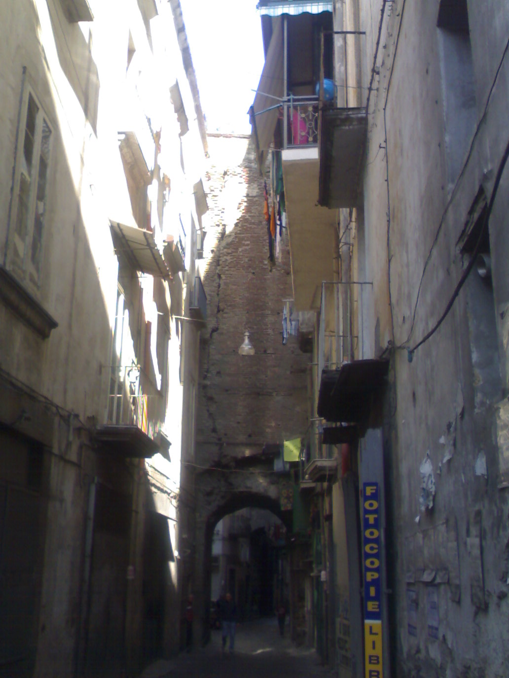 Teatro romano (Napoli)